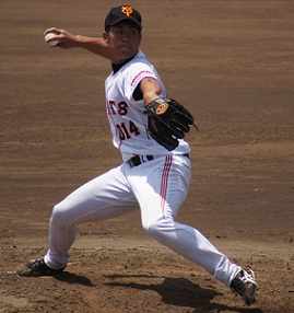 Giants_saitoh_014